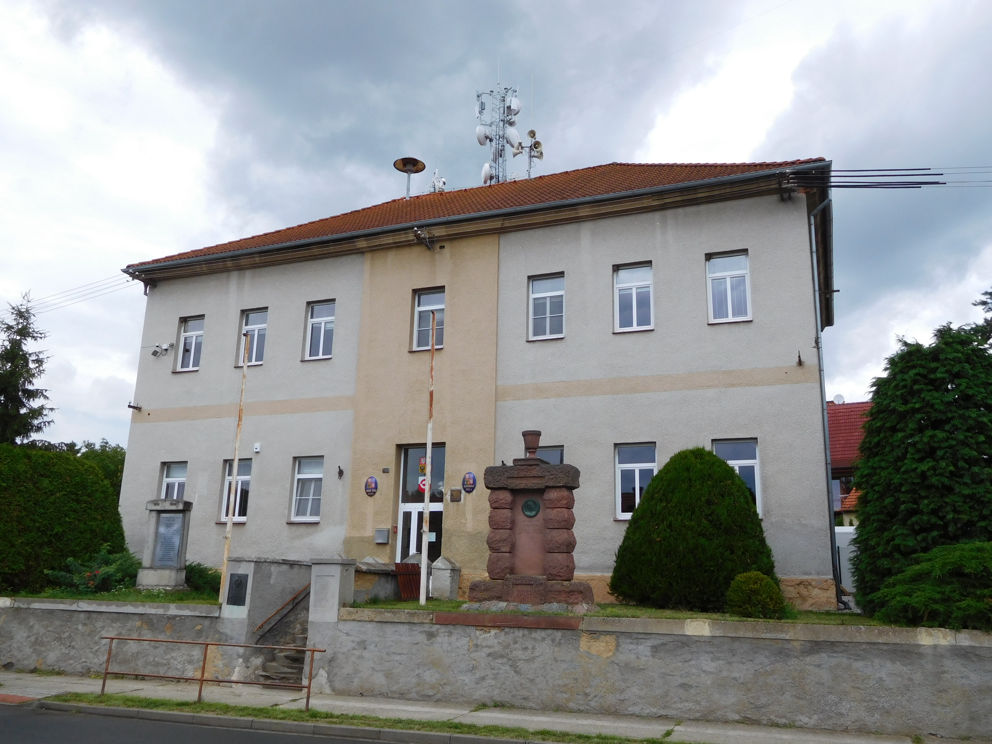 Vochov - obecní úřad a mateřská škola (č.p. 46)